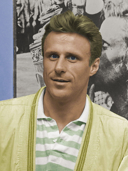 Bjorn Borg introduceert nieuwe after-shave in Bijenkorf Amsterdam